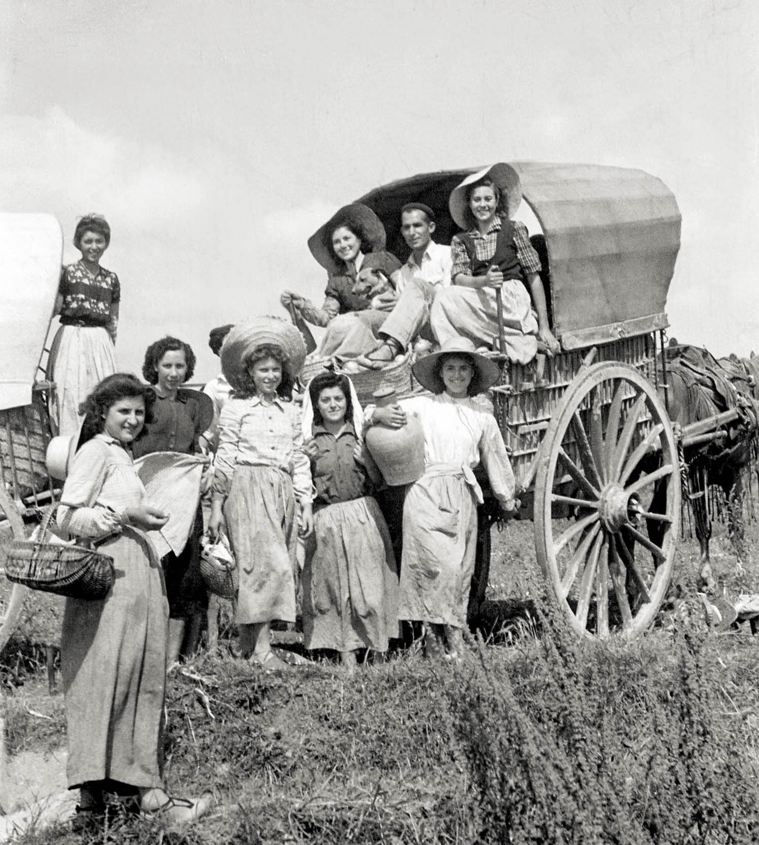 L'Arxiu allibera avui aquesta imatge feta per Ismael Latorre, amb data 02-06-1947, prop de la Torre Espioca, Picassent, de dones valencianes treballant al camp. L'Arxiu conserva 16 negatius amb la mateixa data, dedicats a la collita de la ceba. Dones treballadores i carros pel transport de les cebes són el contingut d'aquests negatius. Aquesta imatge va ser publicada en: Fornés, Alberto; Císcar, José i Latorre, Ismael: Alginet, històries, costums i altres relats, Societat Cultural Alèdua, Alginet, 2003. Dipòsit Legal: V-2546-2003; pàgina 132. Levante, La fuerza de la mujer que retrató Latorre, 6-03-2016 Levante, El captador d'instants, 27-01-2018 El Seis Doble, L'exposició La força de la dona s'inaugura esta vesprada en el Centre Cultural Municipal de Guadassuar, 23-02-2018 Levante-emv-La Ribera: El maltrato a la mujer tiene mucha historia, 17-02-2019. Pàgina 37. De la mateixa tira de negatius es troba una imatge d'aquest fet publicada en: CABRERA PÉREZ, Luis Alberto: Mujer, trabajo y sociedad (1839-1983), Ediciones Sinsentido; Madrid, noviembre 2005. Fundación F. Largo Caballero. Colabora Fundación BBVA. Dipòsit Legal M-47788-2005 ISBN 84-86716-27-6 Fotografia d'Ismael Latorre: Recol·lectores de cebes amb roba de treball, 02-06-1947, Picassent, pàgina 280 d'aquest llibre, amb títol: Ismael Latorre, 1947. Alginet. Recogedoras de cebollas. Propiedad Ismael Latorre. Lozano, Josep i altres. Aljannat III. Monogràfic: Ismael Latorre Mendoza, any 2008. Edita: Ajuntament d'Alginet; ISSN 1886-984 X, pàgina 132. Tractament digital: Vicenç Salvador Torres Guerola.